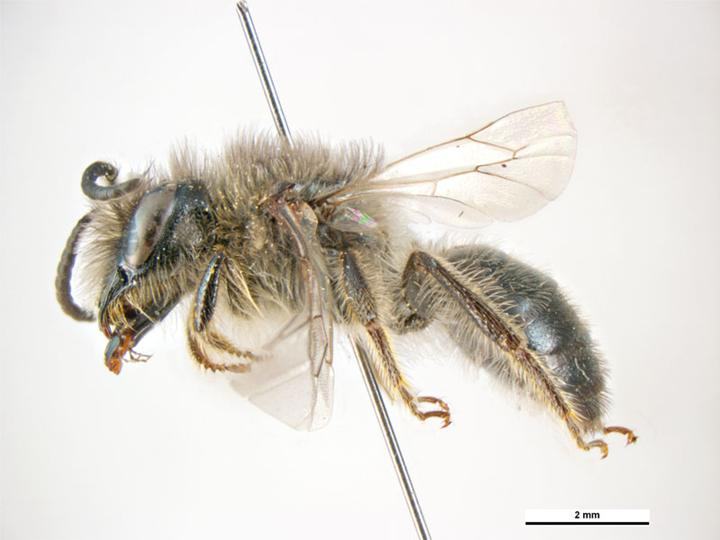 Leioproctus obscurus male